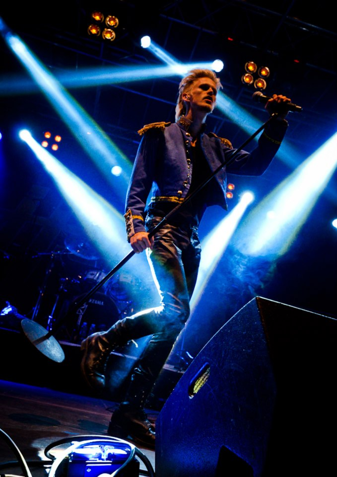 Erik live 2012